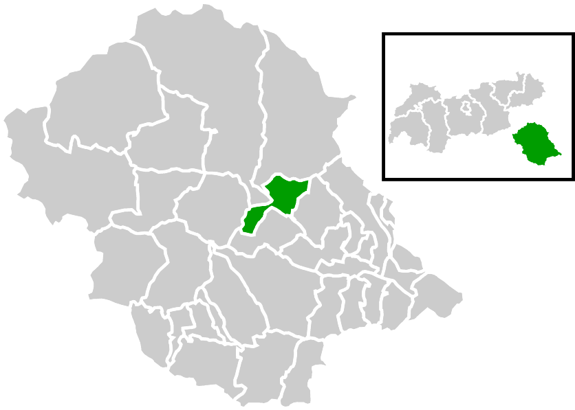 Lage der Gemeinde innerhalb des Bezirks Lienz